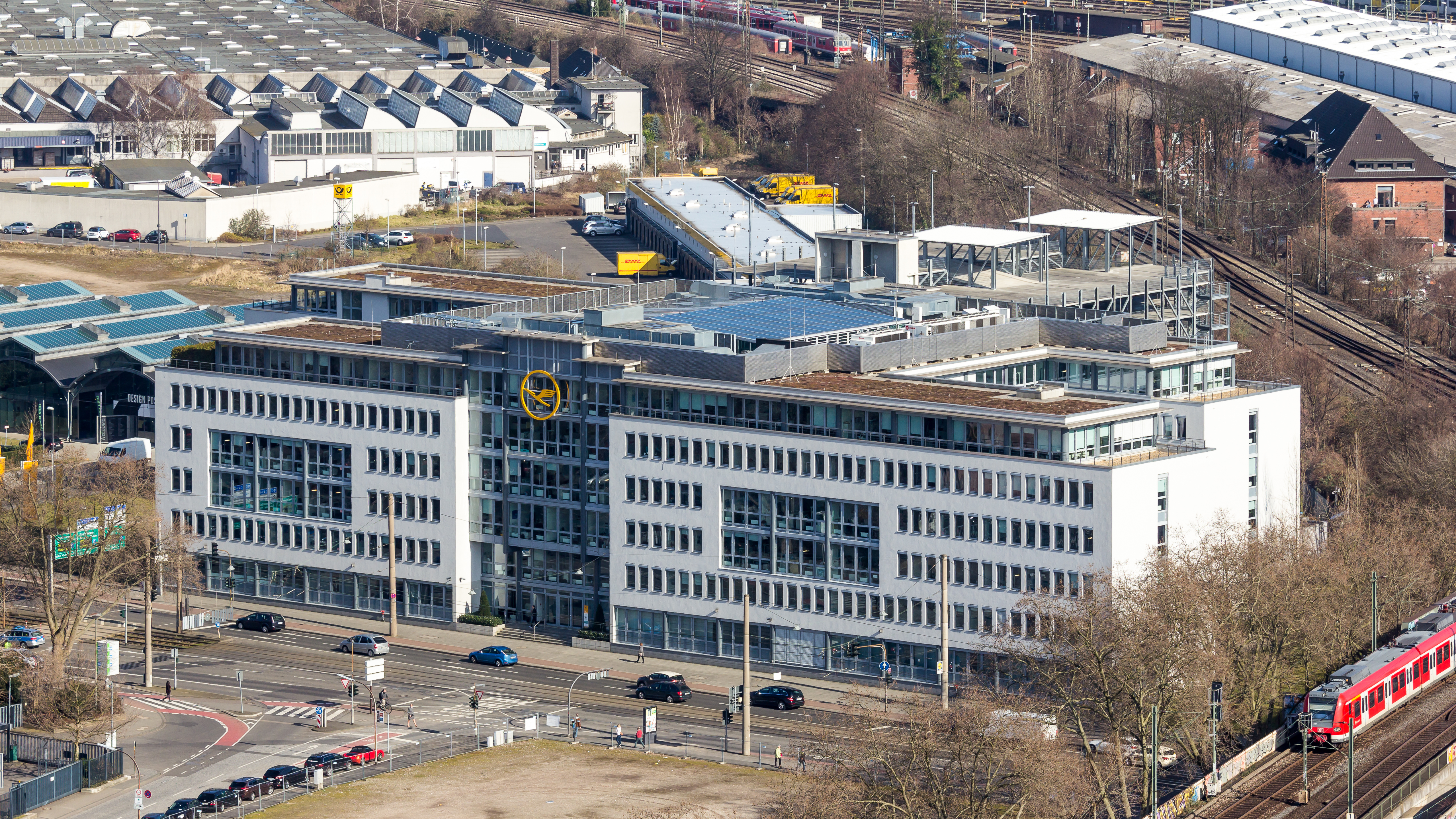 Lufthansa-Zentrale, Köln-Deutz